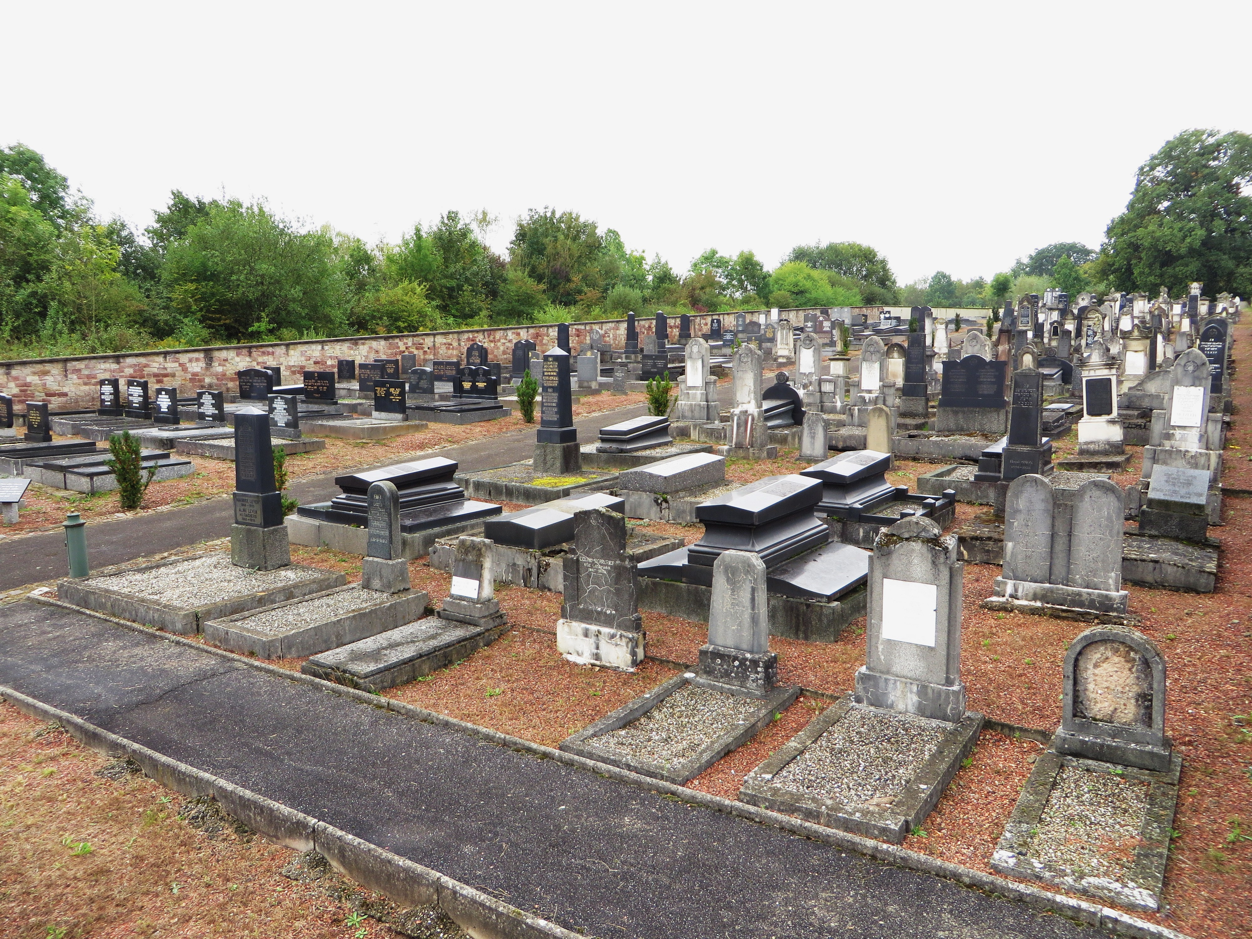 Sarreguemines cimetiere israelite